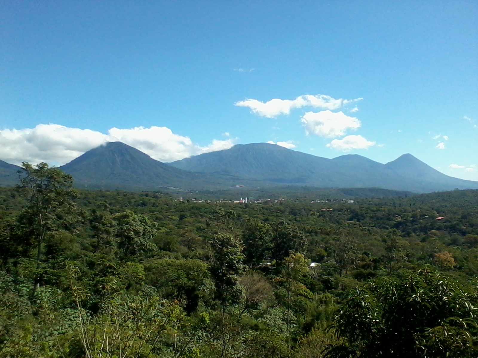 Salcoatitán, El Salvador